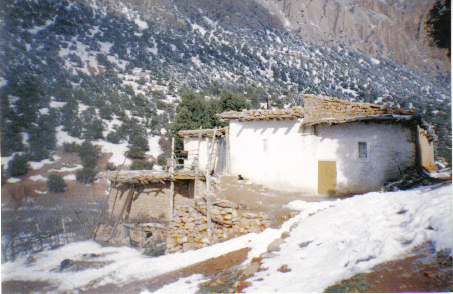 Licence:GFDL Photo personnelle ;Hadraj Prise à Immouzer Marmoucha